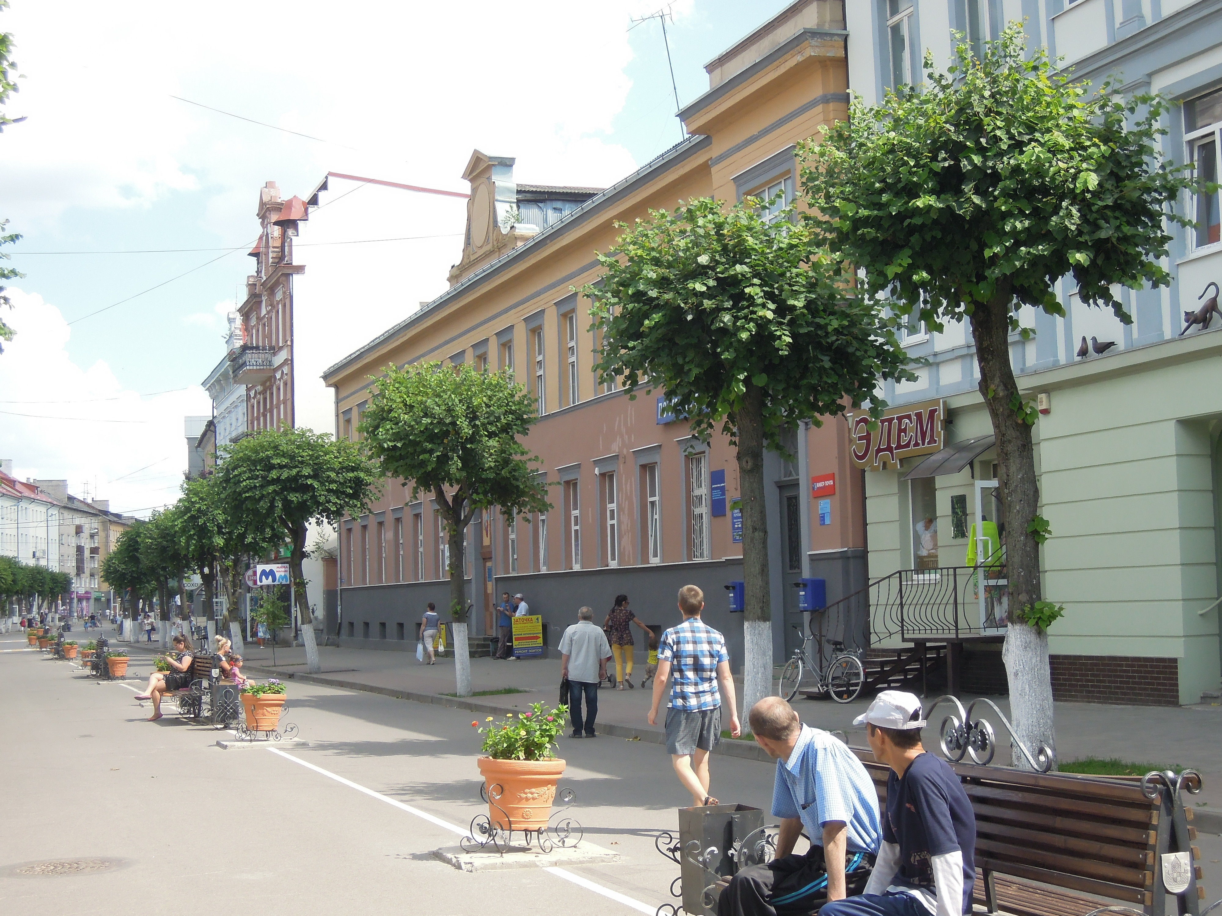 Улица Победы возле старинного почтамта. Советск, Калининградская область.